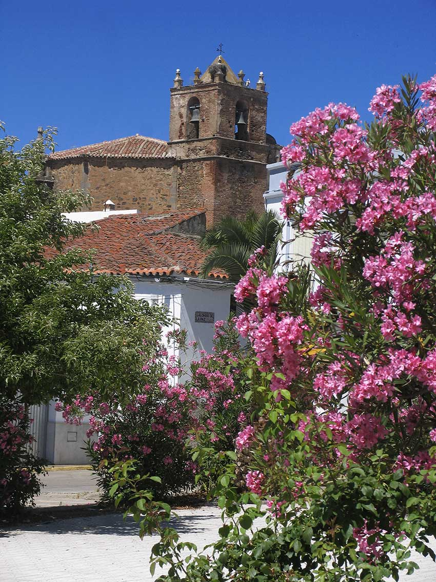 Eglise de Santa Ana